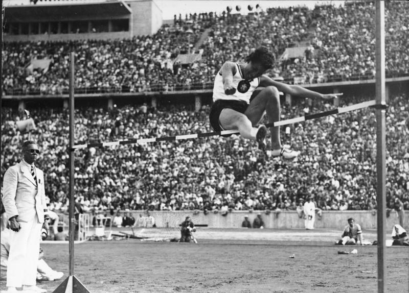 Berlin, Olympiade, Hochsprung, Elfriede Kaun Scherl: Berlin, Olympische Spiele 1936 Frl. Kaun (Deutschland) beim Hochsprung. Abgebildete Personen: Kaun, Elfriede: Hochspringerin, Deutschland